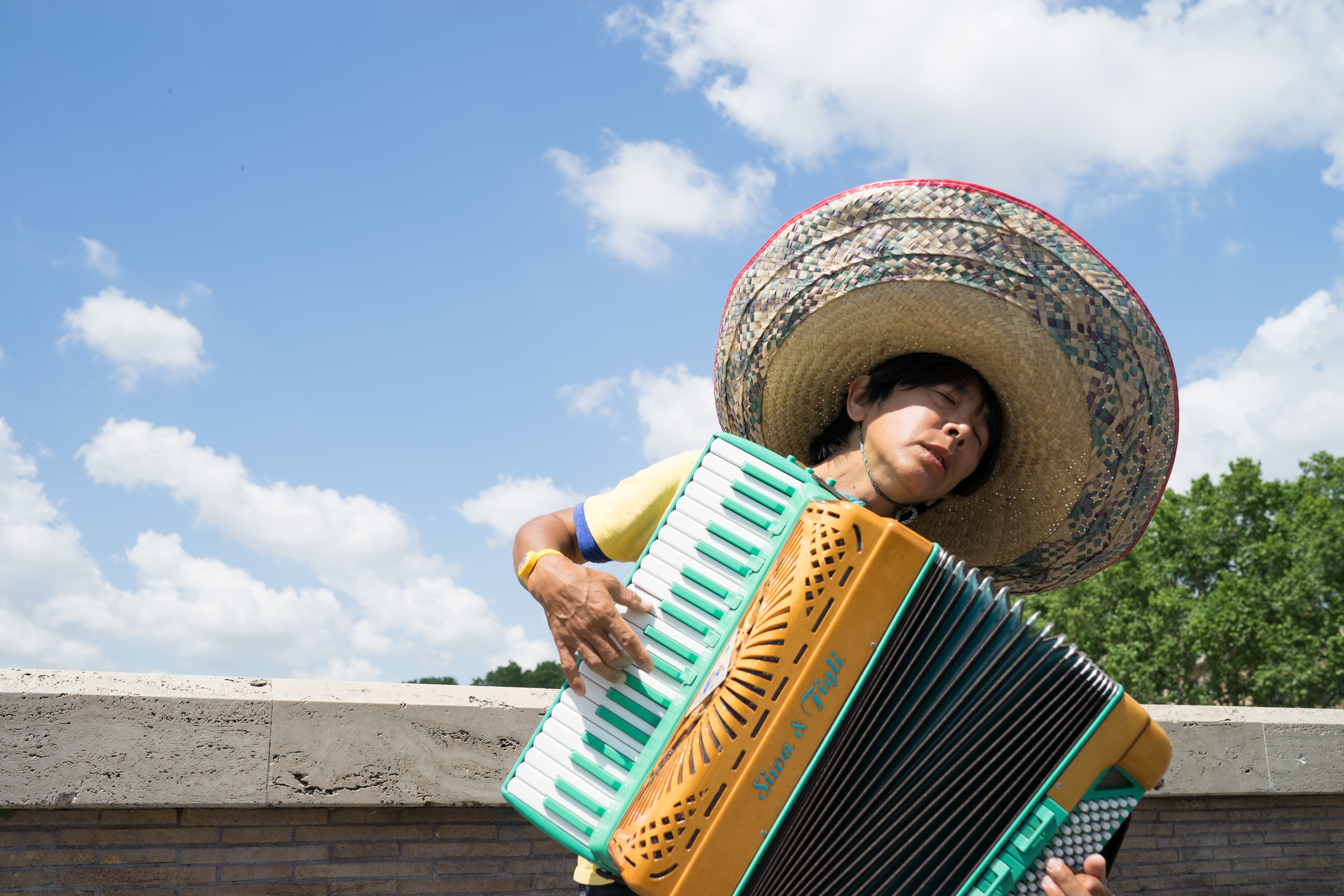 hideshi kibi 2015